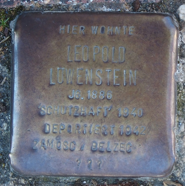 Stolperstein in Soest Auf der Borg 13, Leopold Löwenstein